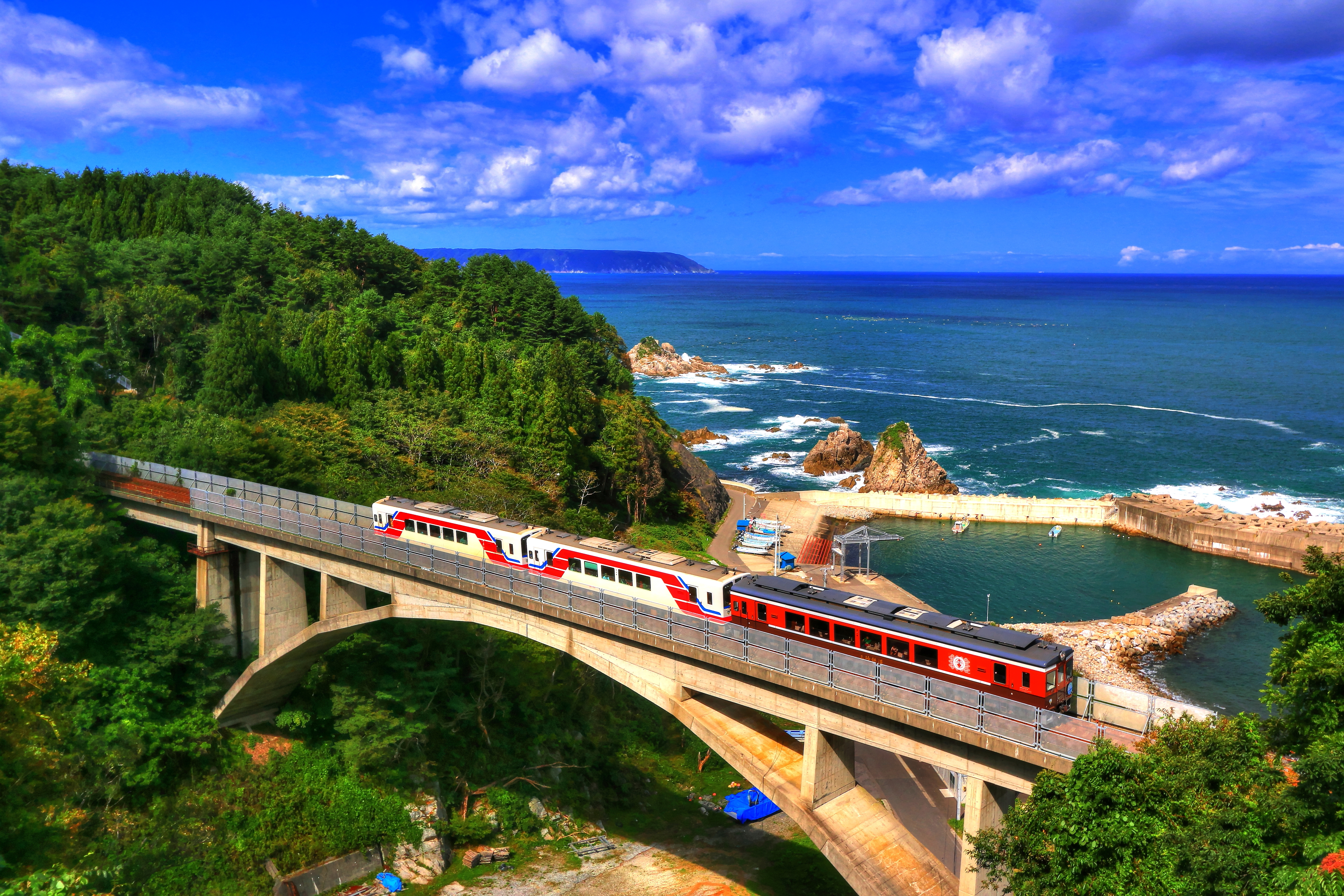 三陸鉄道北リアス線の大沢橋梁